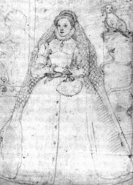 sketch